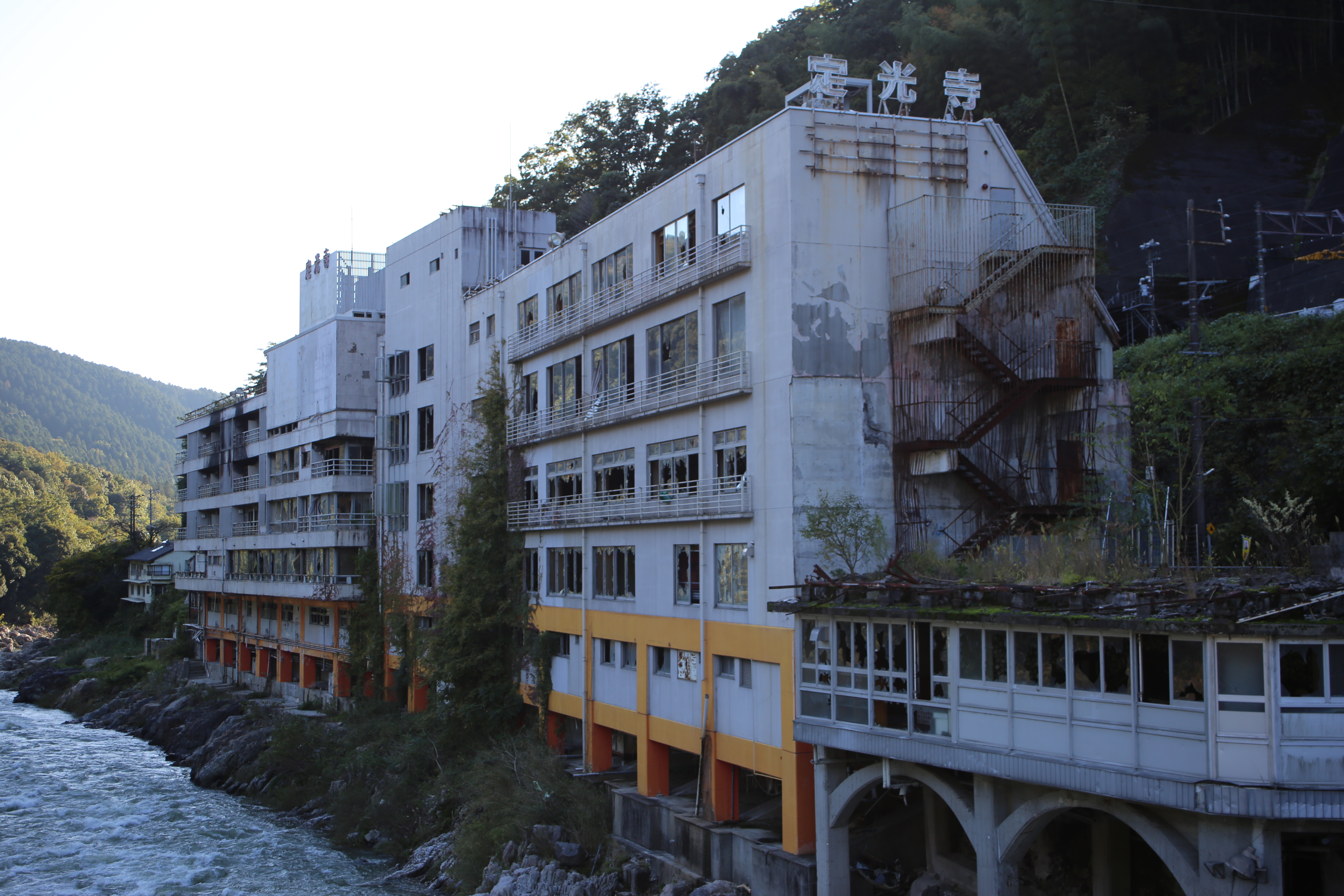 愛知県春日井市玉野町の千歳楼